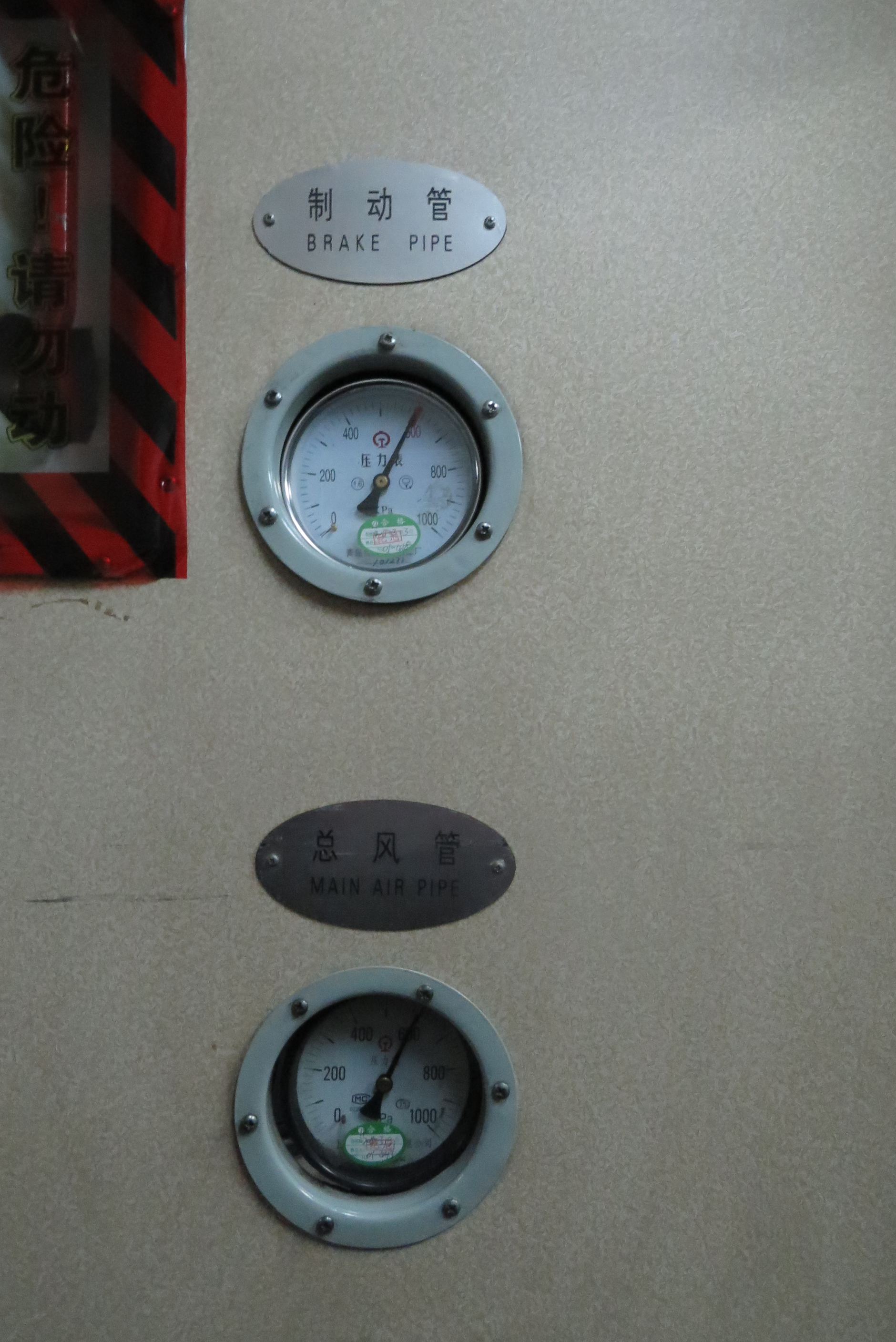 一辆双层25K型客车的制动管风表和总风管风表